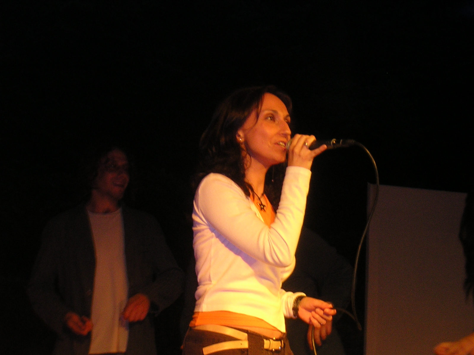 Valentina Moschetti vincitrice dell'edizione 2008 di Cantando Cantando